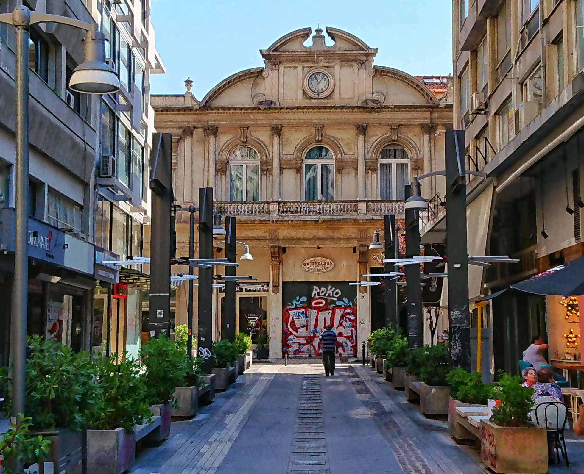 Στοά Μαλακοπή«Στοά Μαλακοπή»